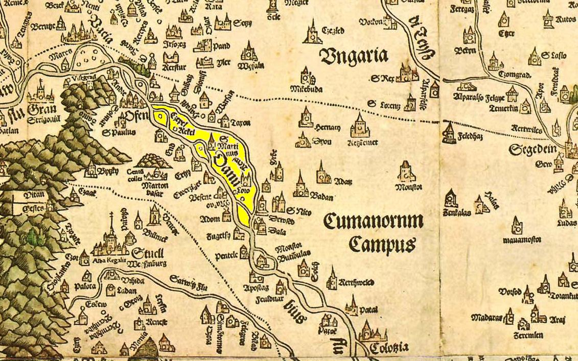 A Csepel-sziget és környéke a Lázár térképen